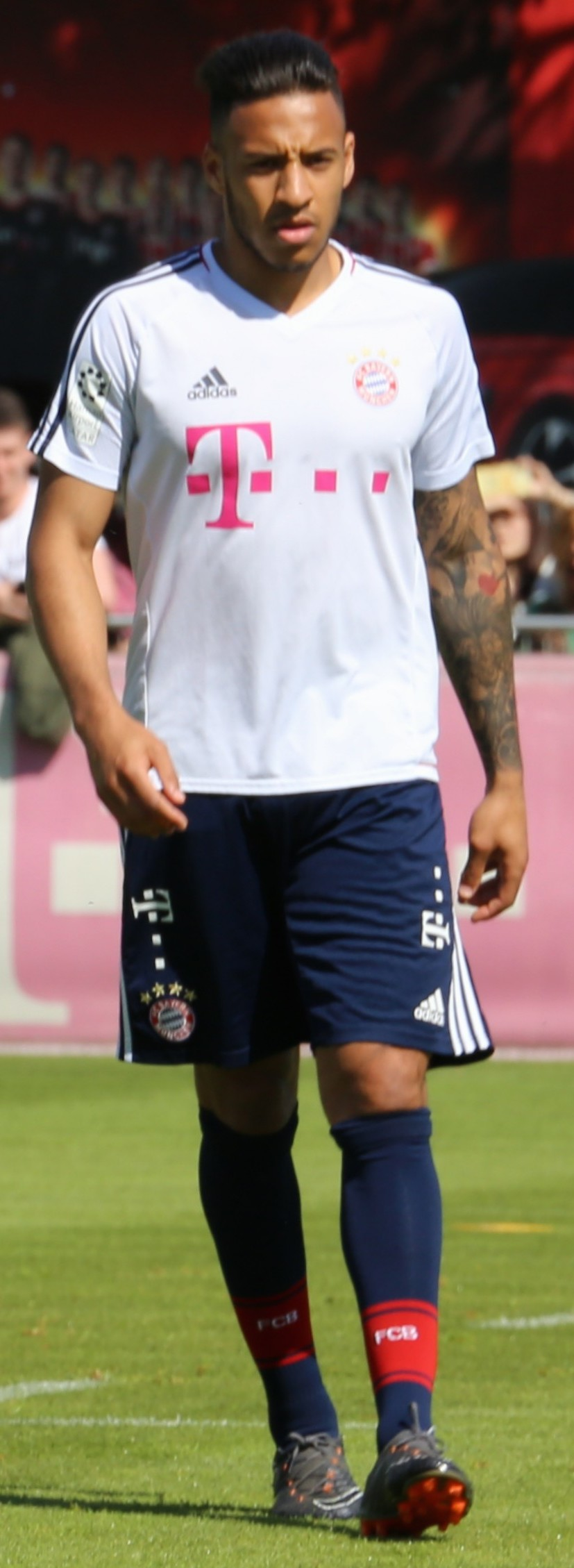 James und Corentin Tolisso, am 8. Mai 2018 beim Training auf dem Gelände des FC Bayern München